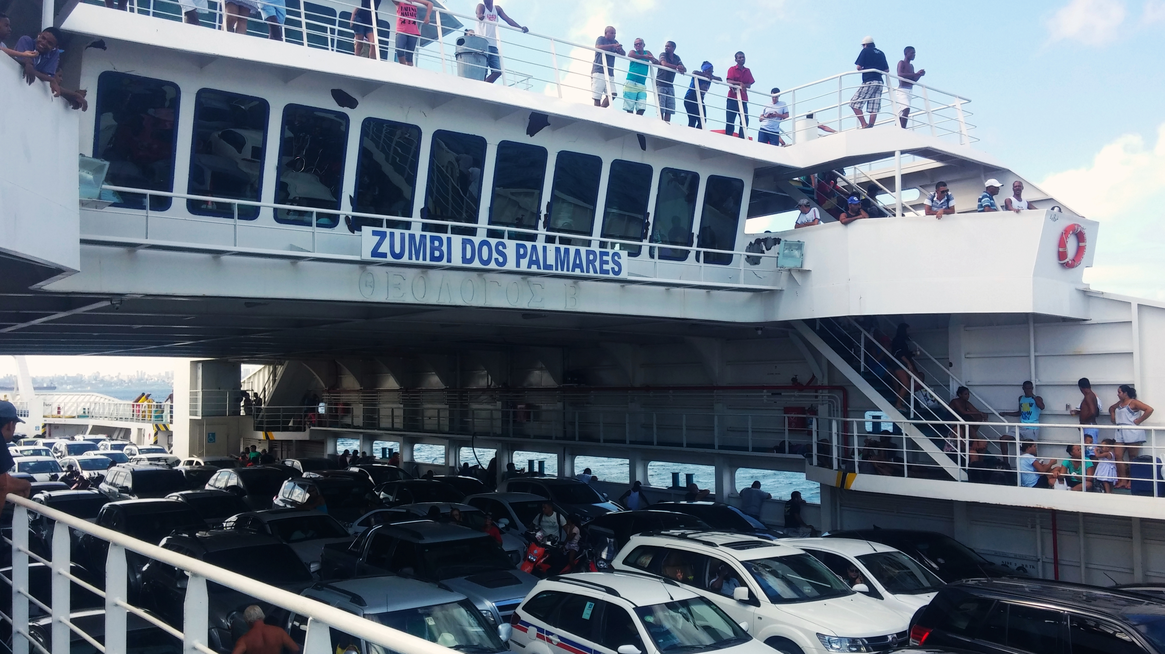 Ferry Zumbi dos Palmares